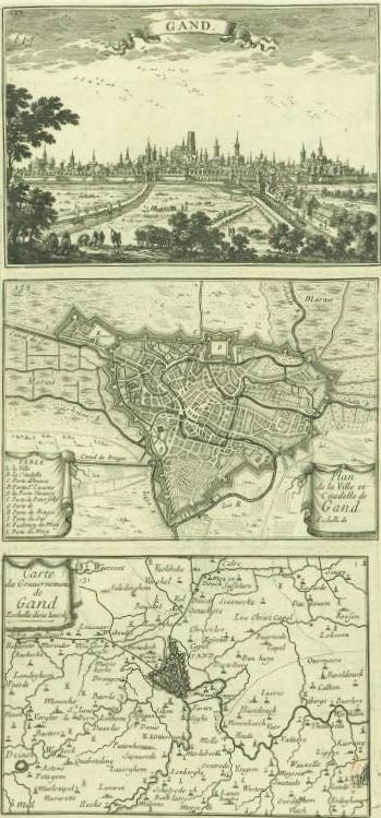 Série de vues et plans de la ville de Gand par le Sieur de Beaulieu. Publié dans Atlas Geographique, contenant La Carte générale des X. Provinces des Païs-Bas Catholiques, et les Particulières de Brabant, des Seigneuries d'Anvers et de Malines, des Duchez de Limbourg et de Luxembourg, des Comtez de Namur, de Hainaut, de Cambresis, de Flandres, et d'Artois. Tome VI.